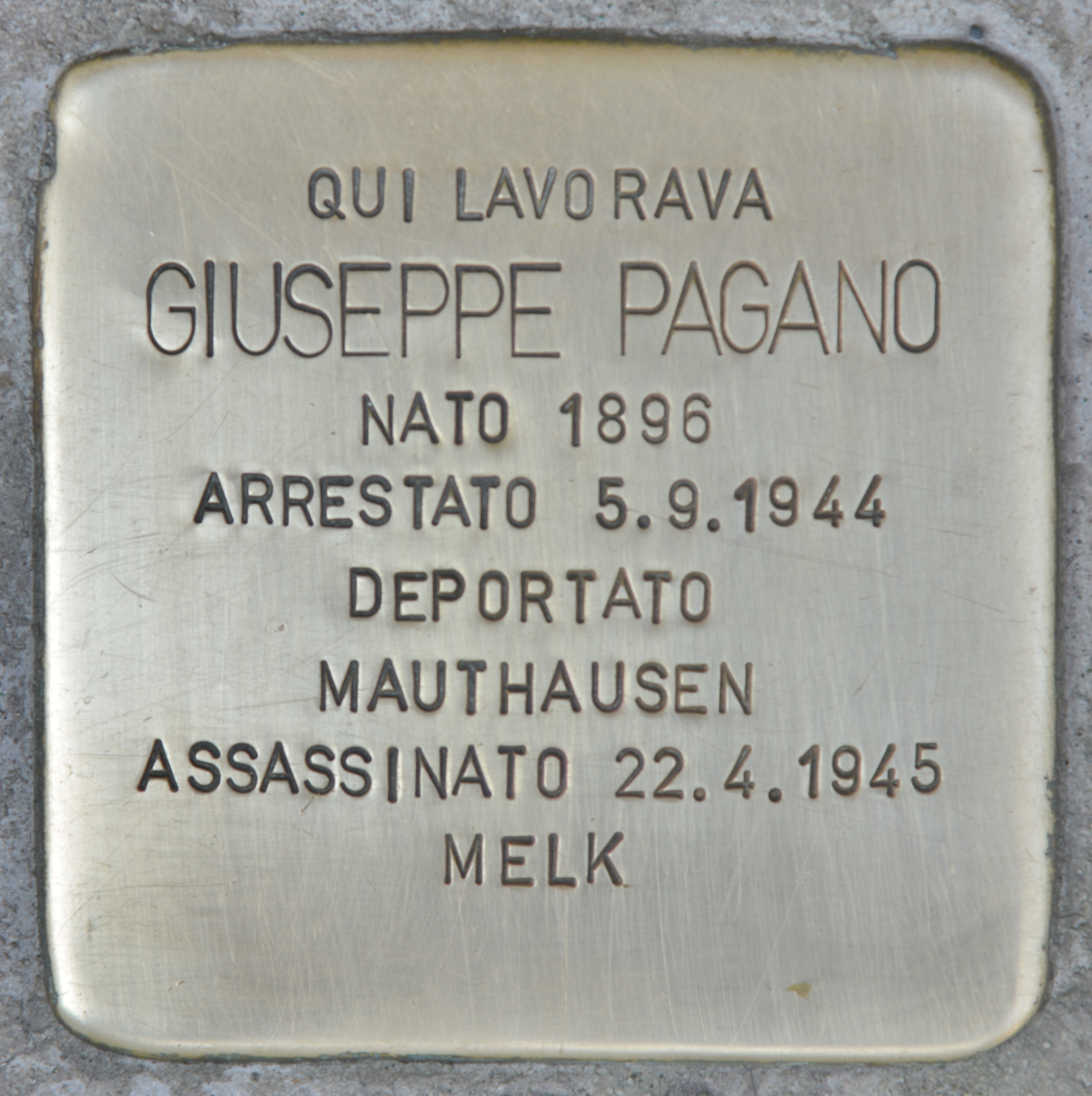 Stolperstein für Giuseppe Pagano